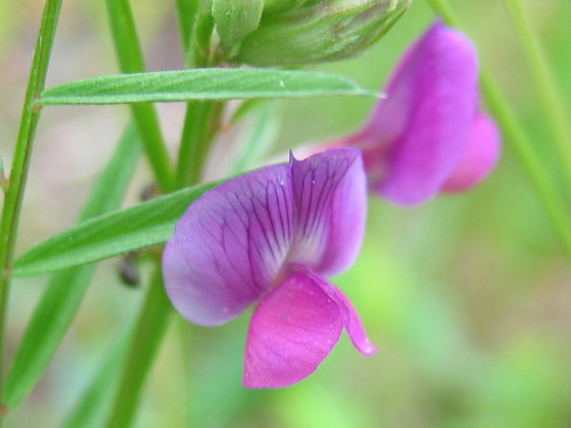 Vicia sativa ssp. nigra